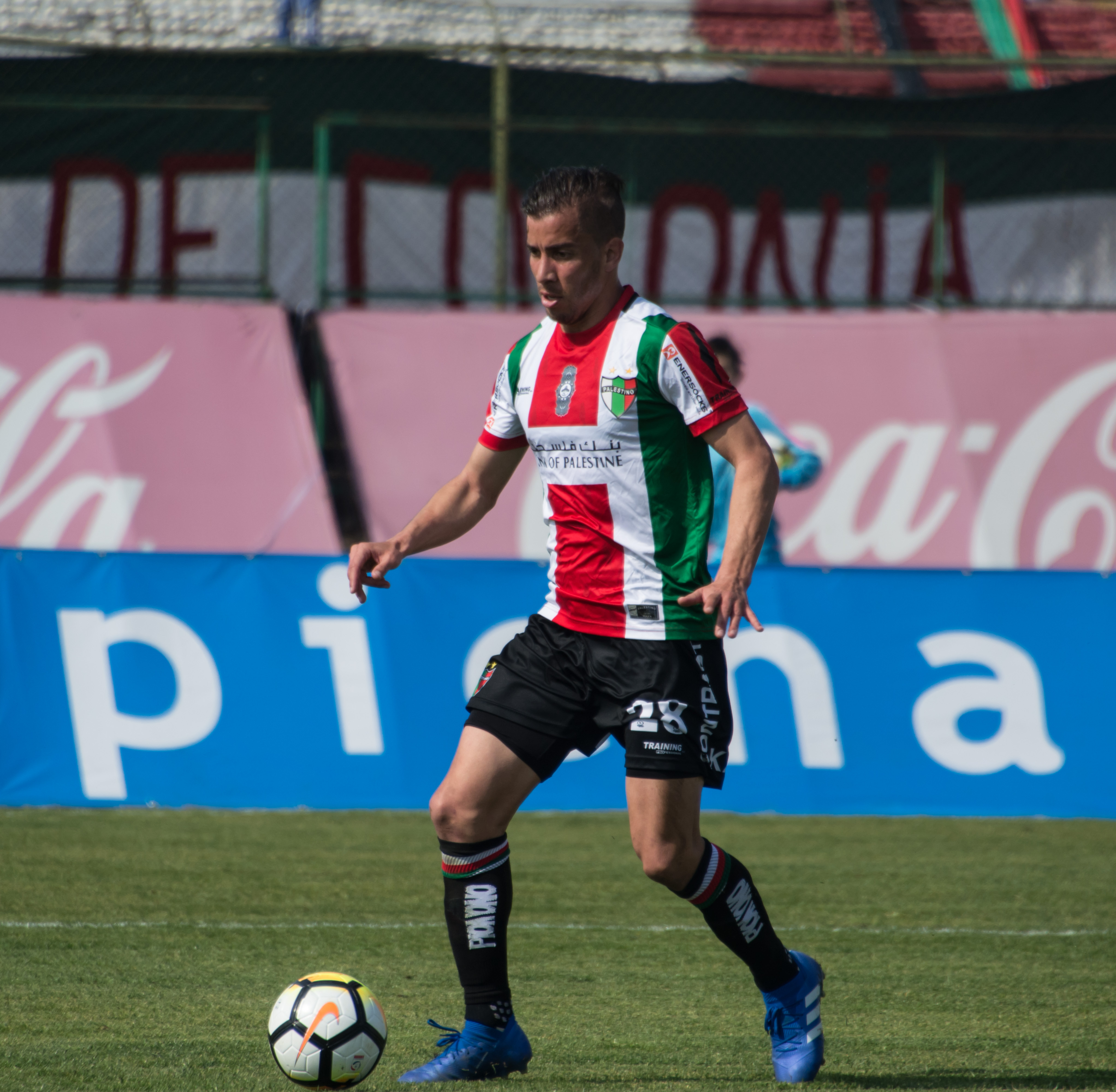 Agustín Farías, Palestino v Deportes Temuco, Estadio Municipal de La Cisterna, La Cisterna, Santiago, Chile